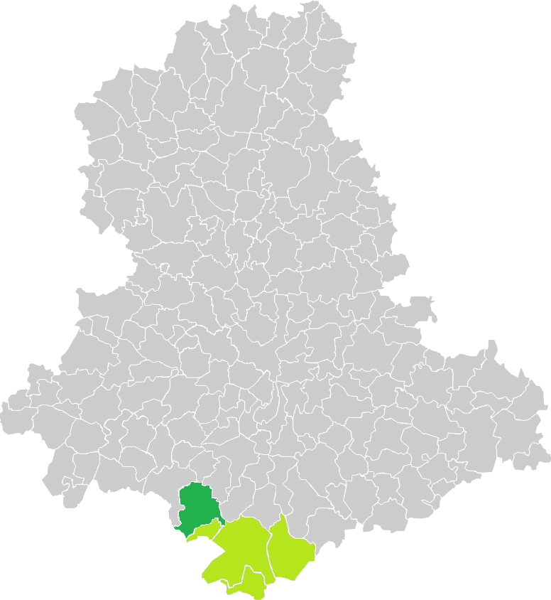 Carte de situation de la commune de Ladignac-le-Long (en vert foncé) dans le votre Canton (en vert clair) sur une carte des communes de la Haute-Vienne